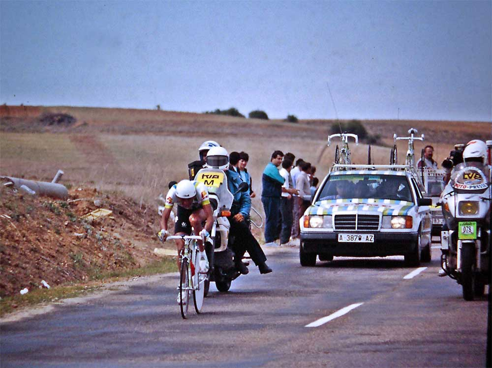 Fabio Parra en la contrarreloj Valladolid-Medina del Campo, en la Vuelta Ciclista a España de 1989